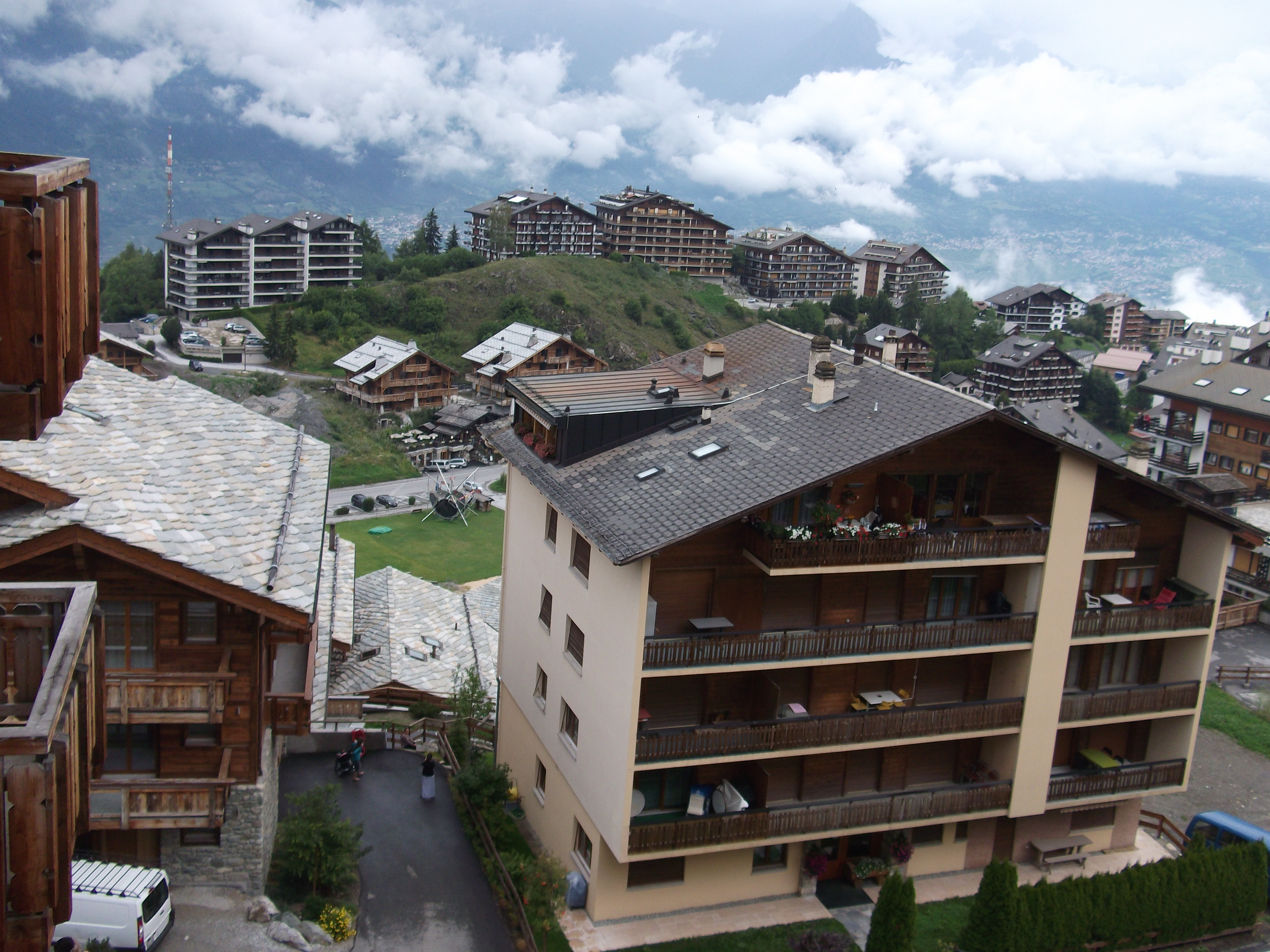 מרכז הכפר הוט-ננדה